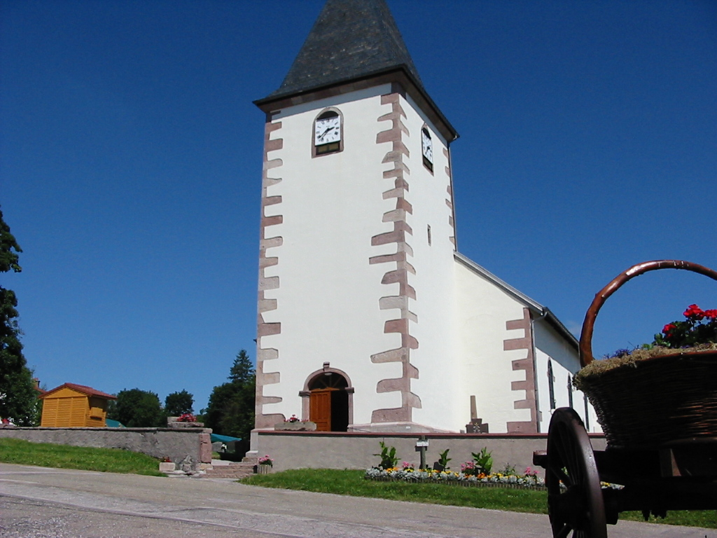 Le Haut du Tôt (département des Vosges, France). L'église du hameau, bâtie par les habitants en 1832.